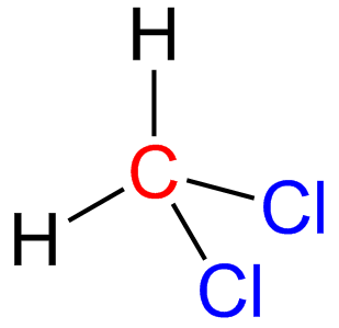 Dichloormethaan: beide chlooratomen (blauw) zitten gesubstitueerd op hetzelfde koolstofatoom (rood); geminale substitutie